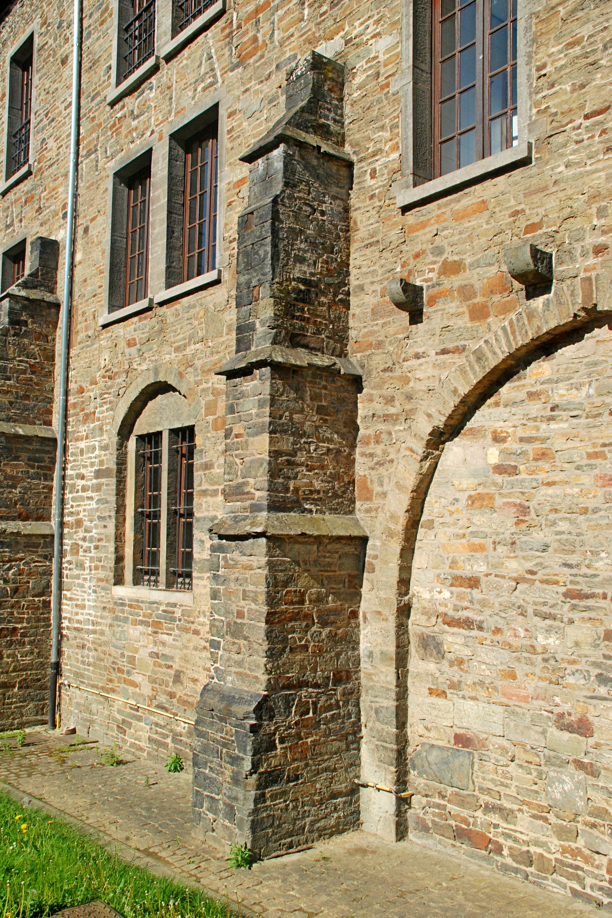 Belgique- Brabant wallon - Villers-la-Ville - ancien moulin abbatial